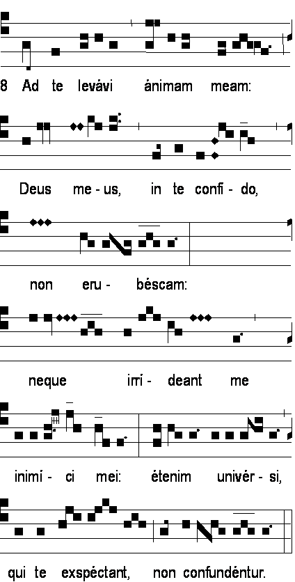 Introït "Ad te levavi" (i in Adventus)